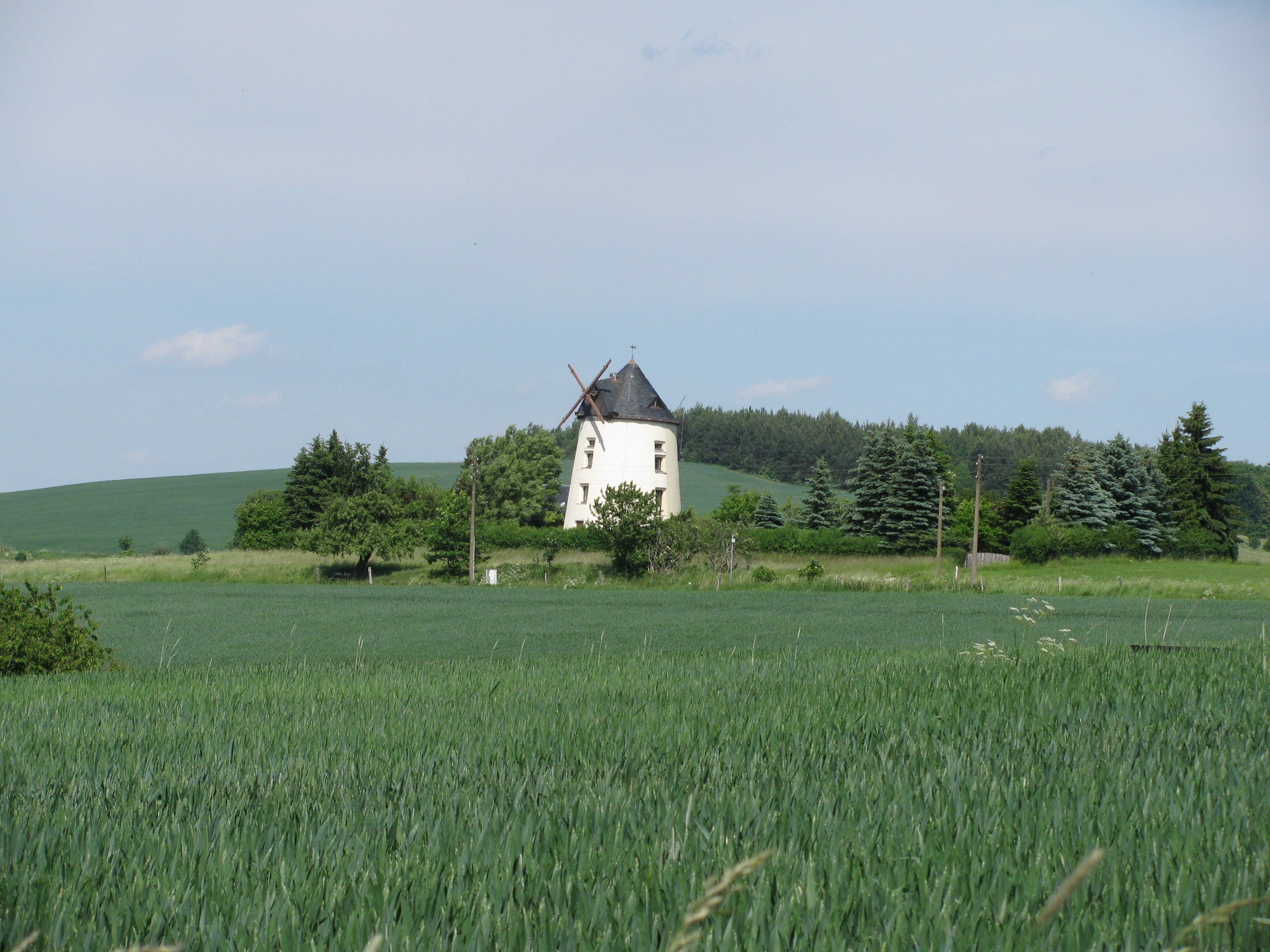 Reitzendorfer Windmühle, nahe Ortslage Zaschendorf, Ortsteil von Dresden